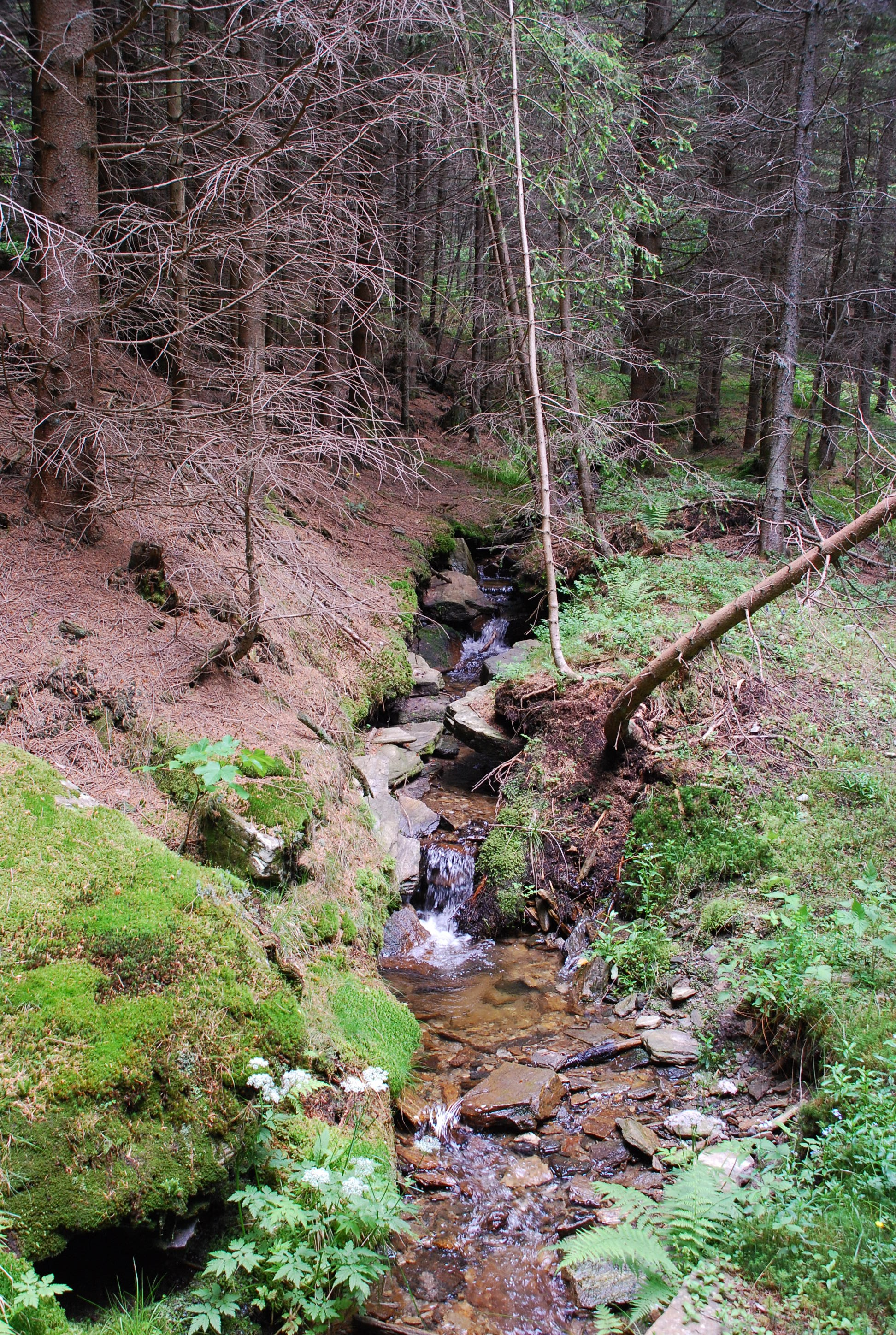 Gratzenbach frühere Wasserleitung